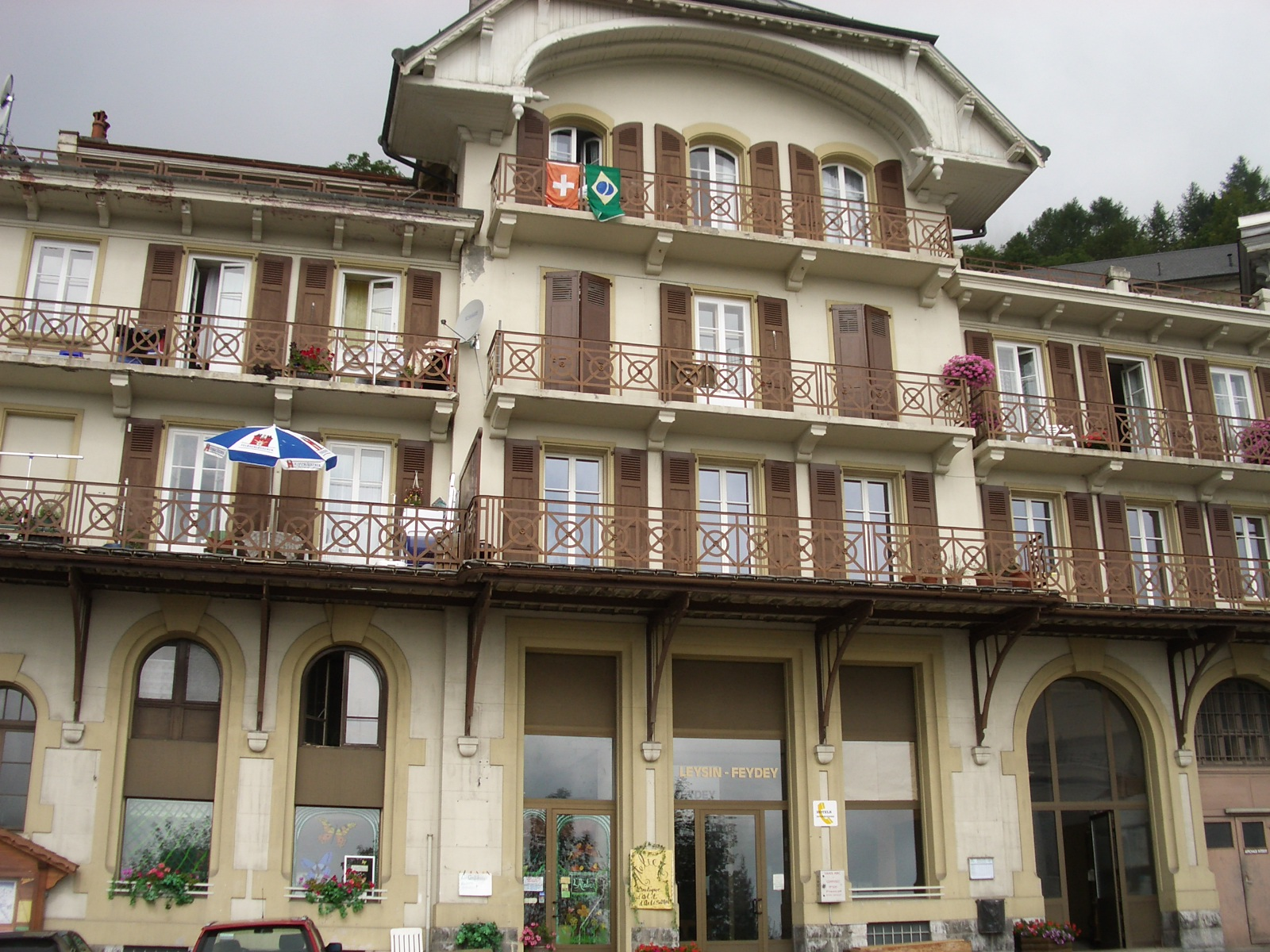 Leysin VD, Switzerland self-made, August 2006